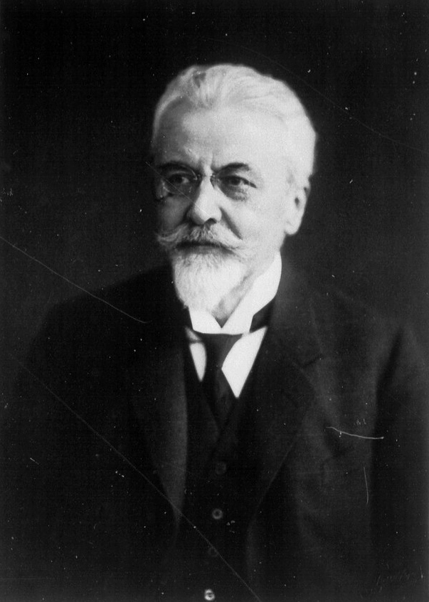 Wilhelm Busch (1861-1929), Professor für mittlere und neuere Geschichte an der Philipps-Universität Marburg, Jubiläumsrektor 1927.